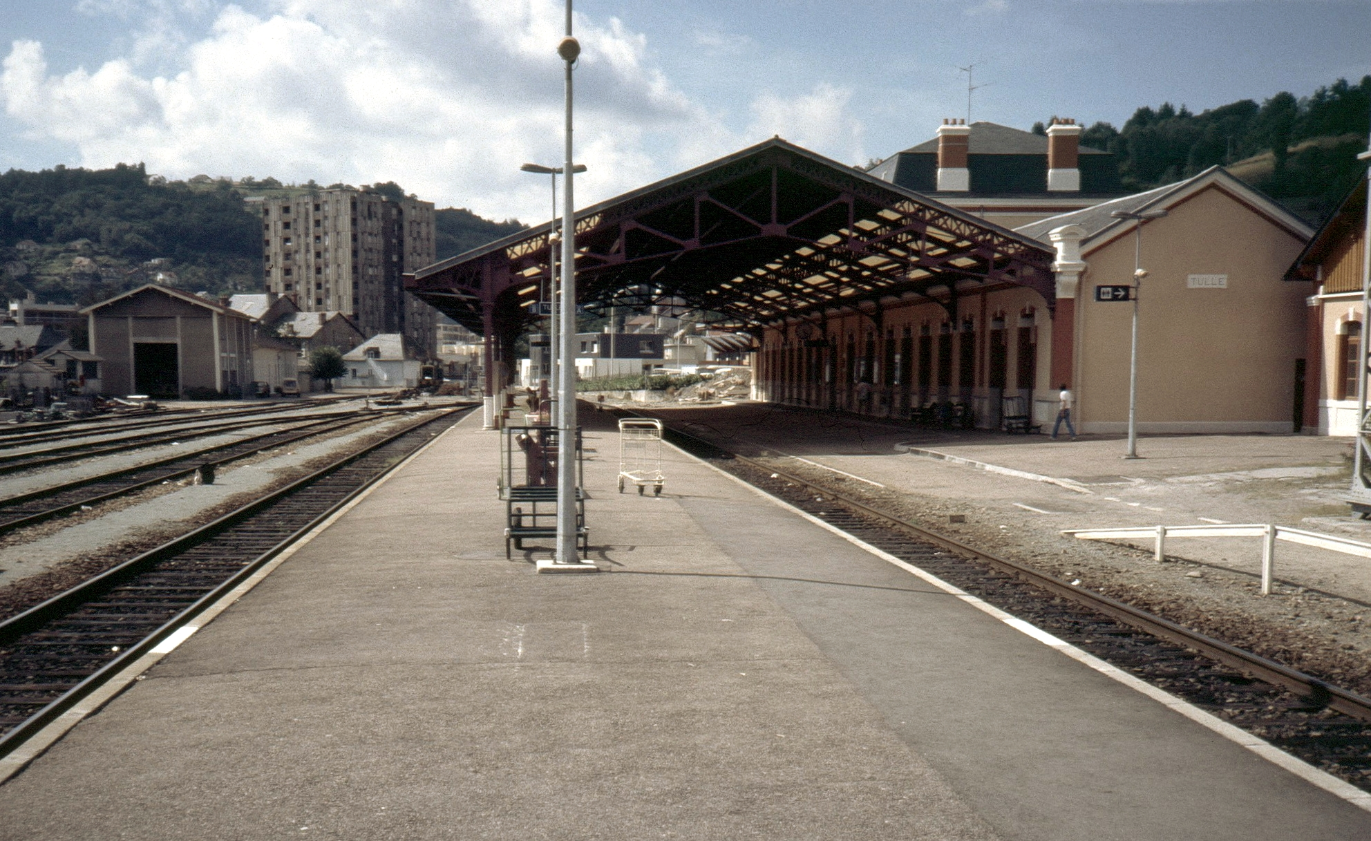 Gare de Tulle